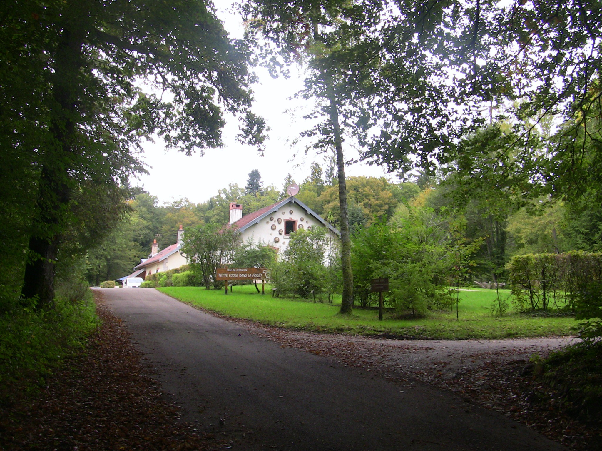 La petite école dans la forêt aux grandes Baraques de la forêt de Chailluz, à Besançon (Doubs, France).